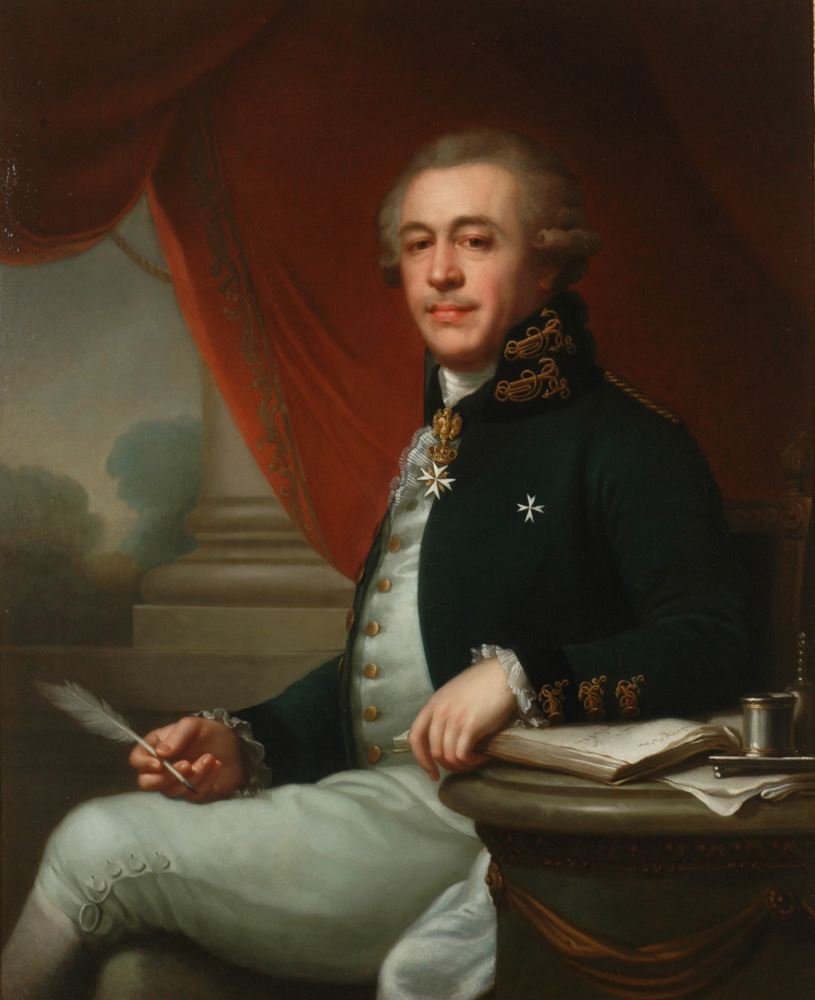 Портрет Ивана Лазаревича Лазарева. 1790. Из имения Железники Калужской губернии. Калужский Областной Художественный Музей